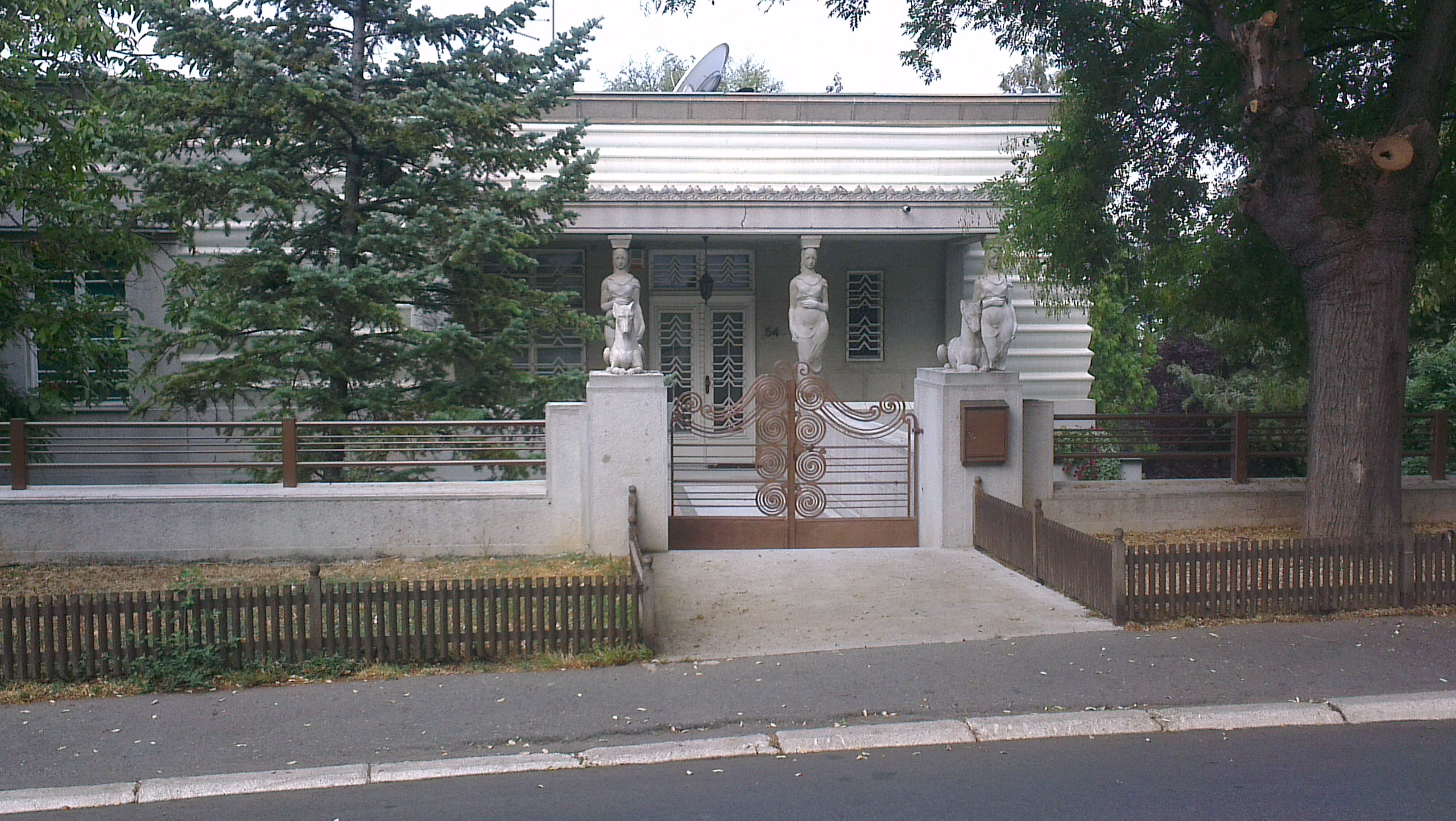 Вила Стевке Милићевић у Београду